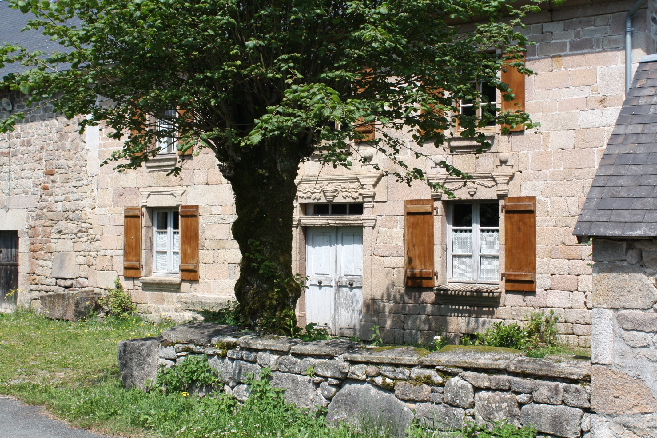 Drouillat - Corps de ferme Bâtiment caractéristique de la région, Monument historique, Patrimoine architectural